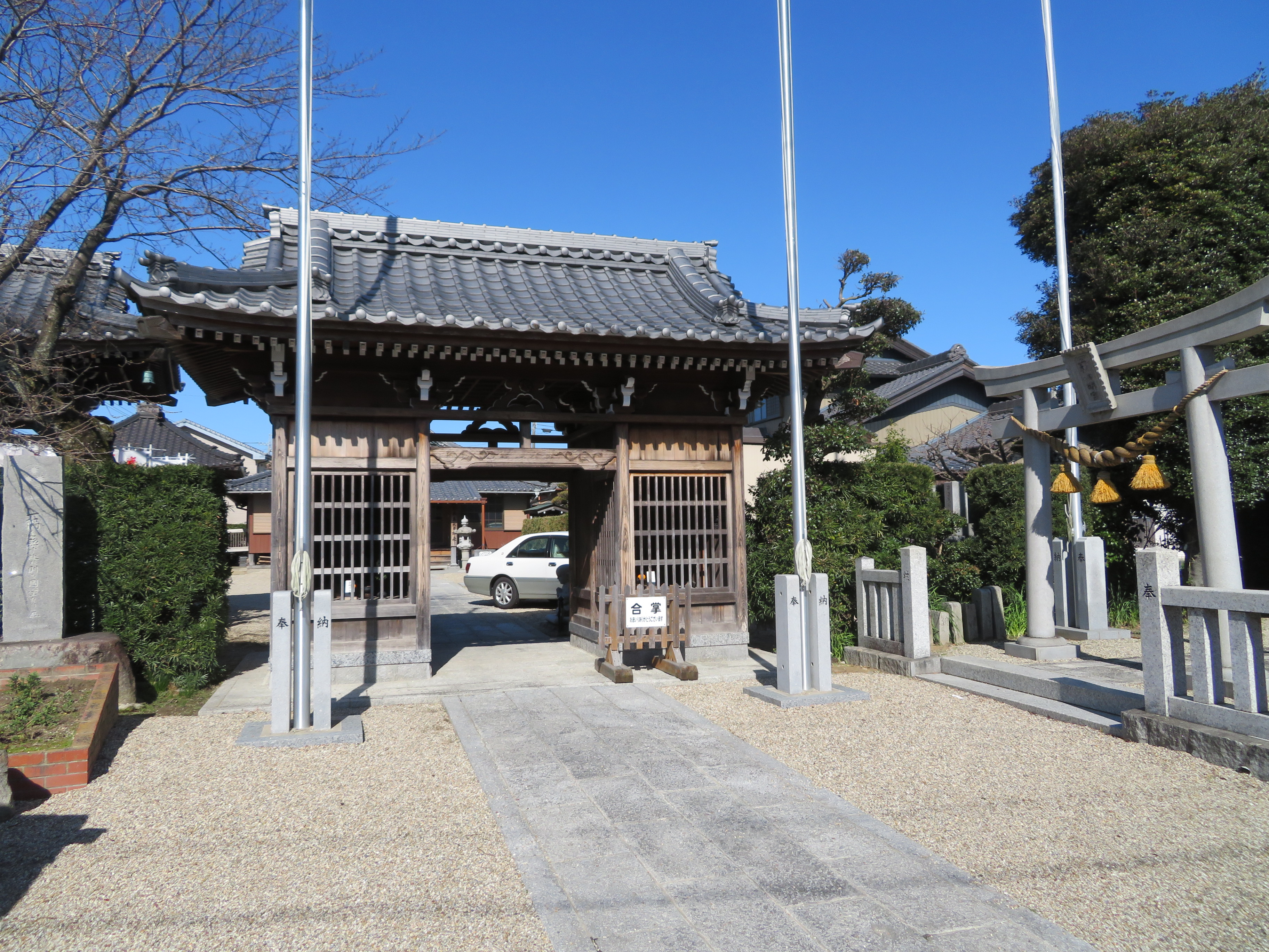 法性寺（岡崎市法性寺町）